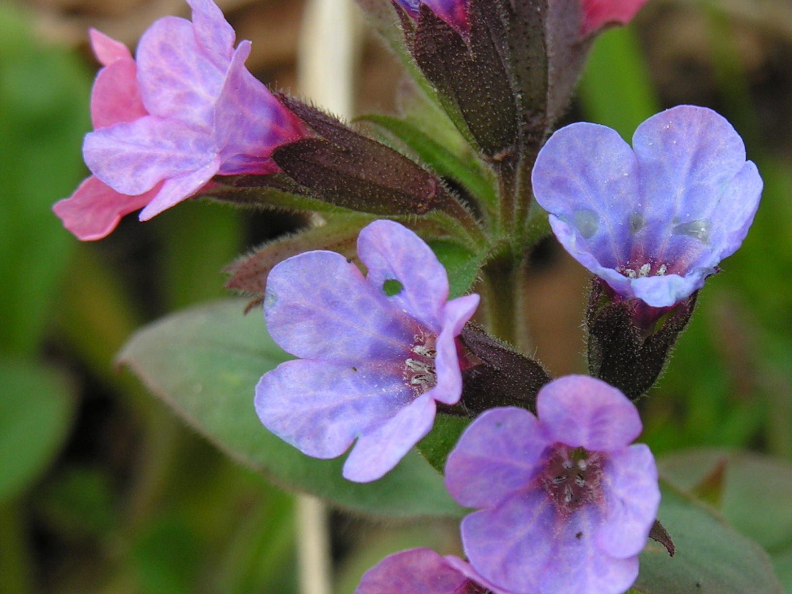 Tamsios plautės (Pulmonaria obscura) žiedai Šeima. Agurkliniai (Boraginaceae) Foto: Algirdas, 2006 m. balandžio 28 d.